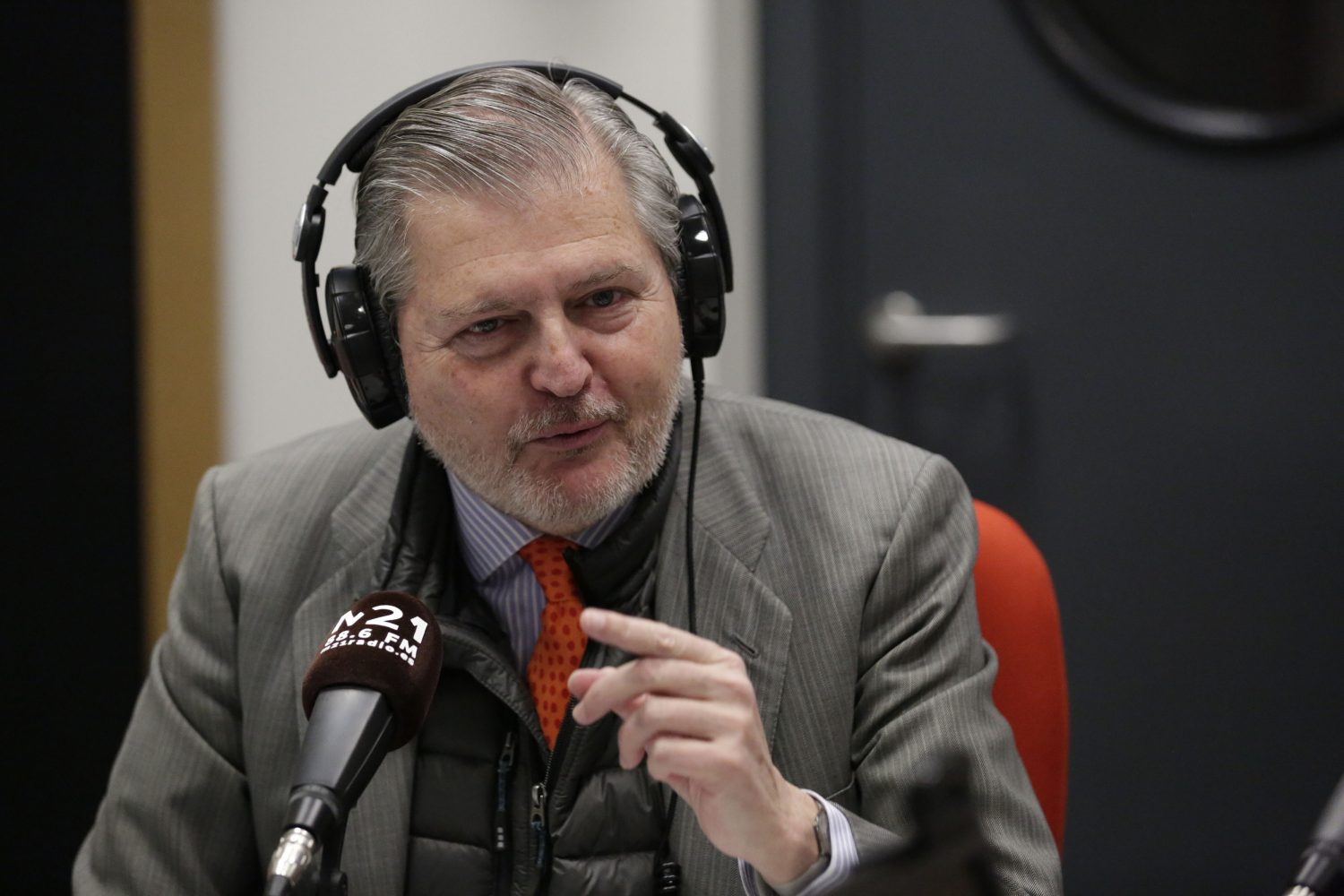 La emisora escuela del Ayuntamiento de Madrid M21 ha recibido en la mañana de hoy martes, 7 de marzo, la visita del ministro de Educación, Cultura y Deporte, Iñigo Méndez de Vigo, quién acompañado por la alcaldesa de Madrid, Manuela Carmena, ha participado, además, en el programa La Corrala, la revista radiofónica matinal que hace Cristina Sánchez Barbarroja.